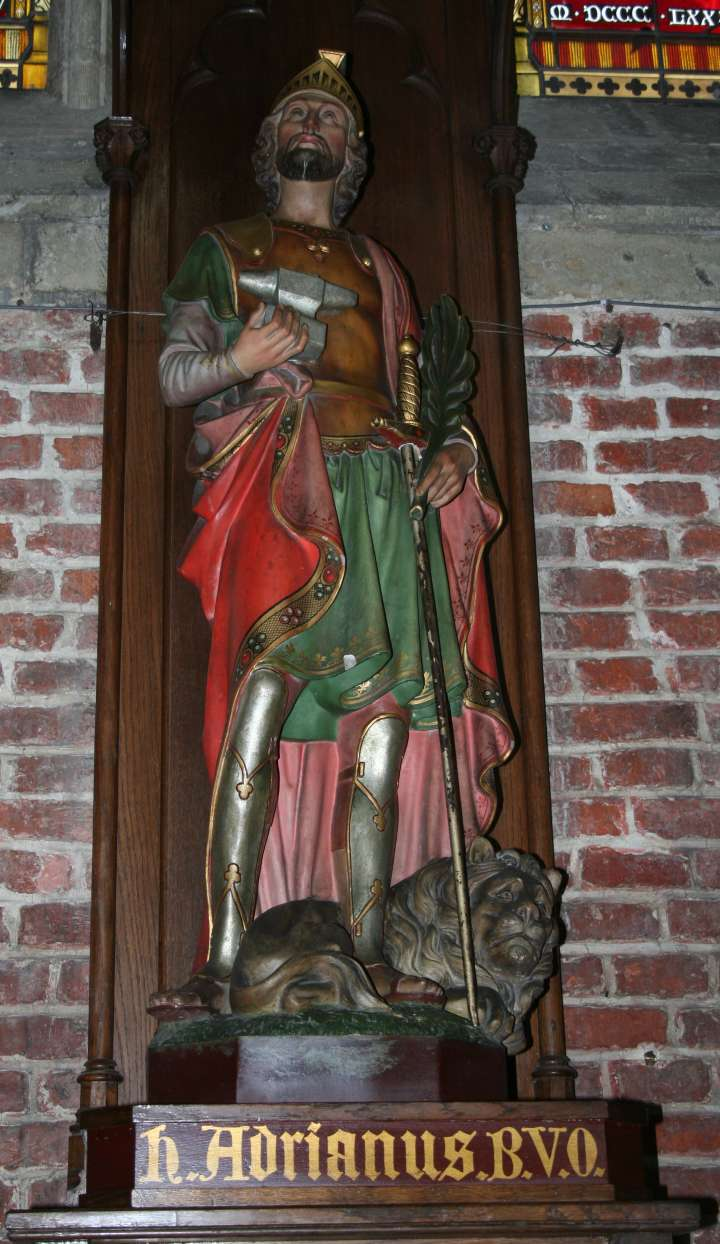 St. Adrianus